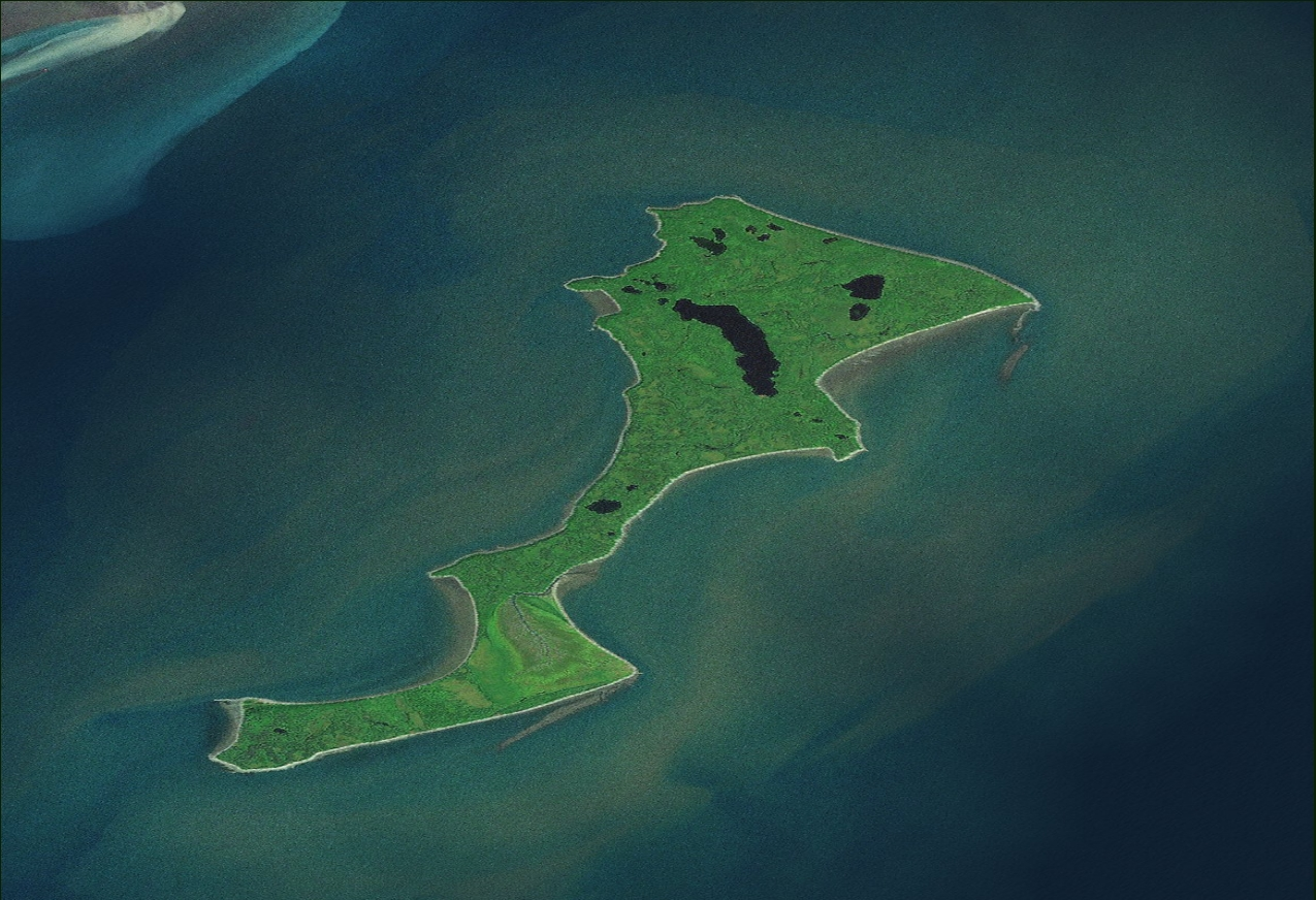 Kalgin Island from space.